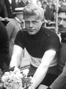 Wielrenner Ko "Jacobus" Willems, onder andere winnaar van Olympisch goud op de spelen van Parijs 1924 op het onderdeel 50 kilometer baan. Ko Willems met bloemen plaats onbekend.